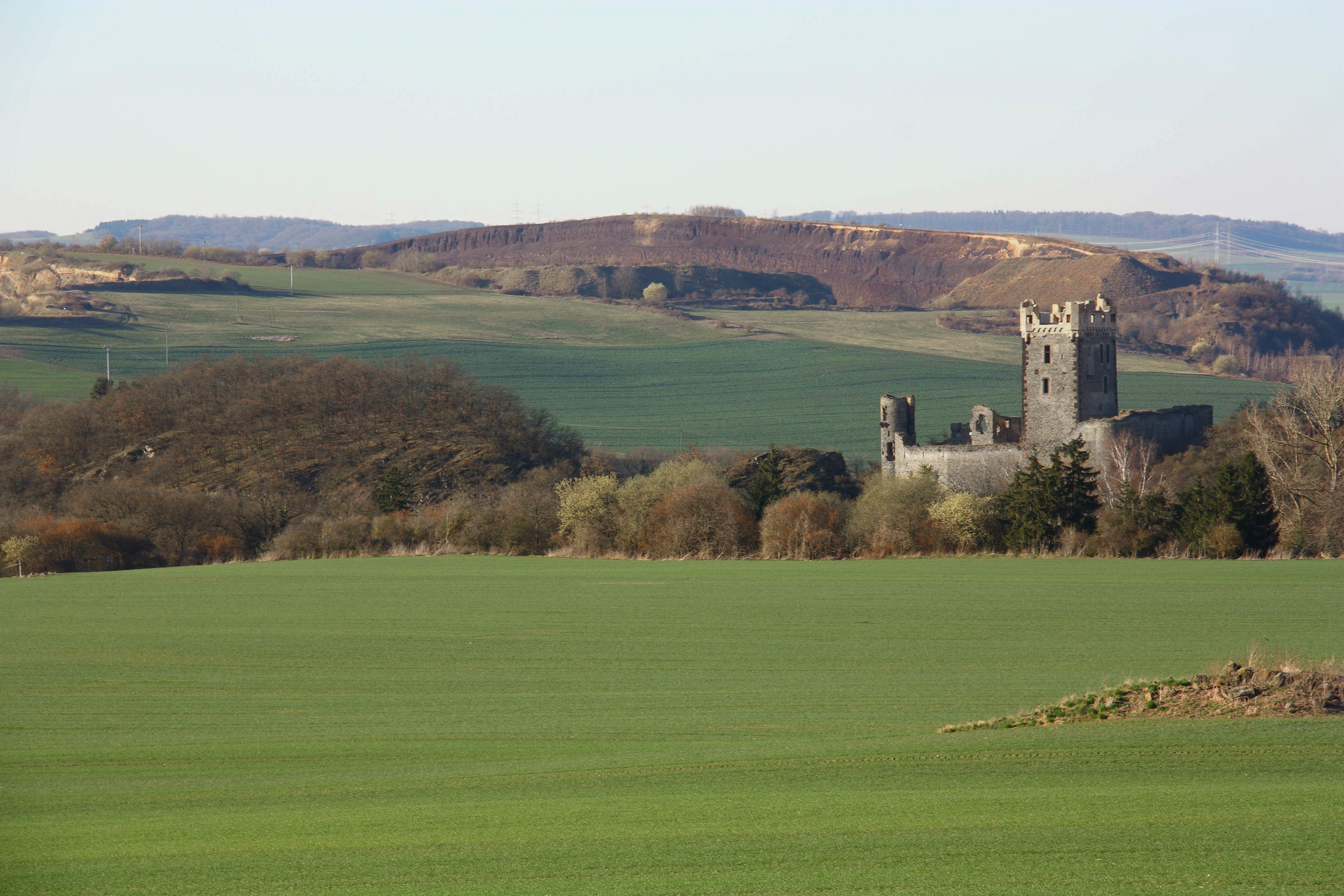 Die Burg Wernerseck zwischen Ochtendung und Plaidt.